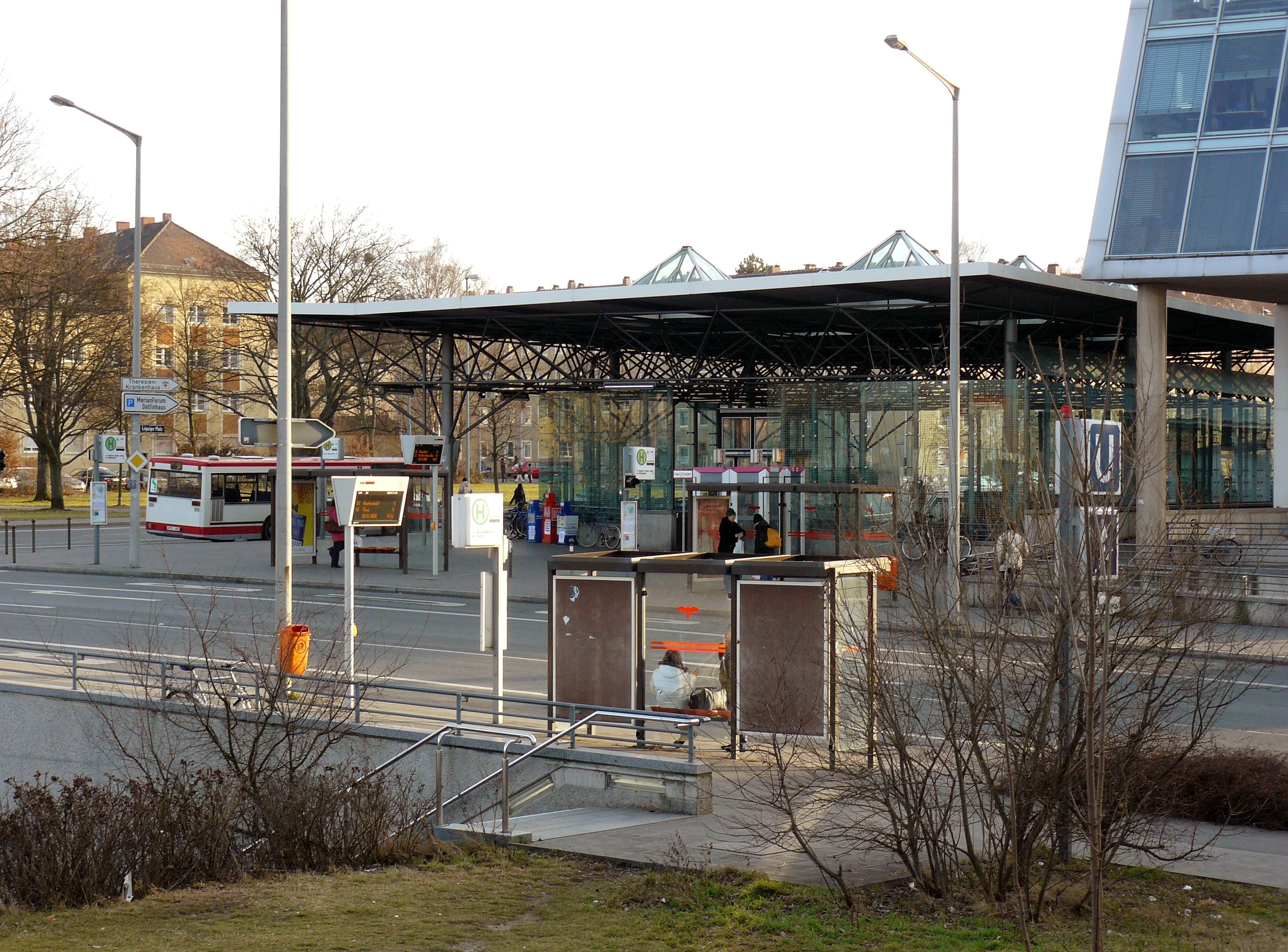 U-Bahnhof Nordostbahnhof mit Bushaltestellen der Linien 21, 45 und 46